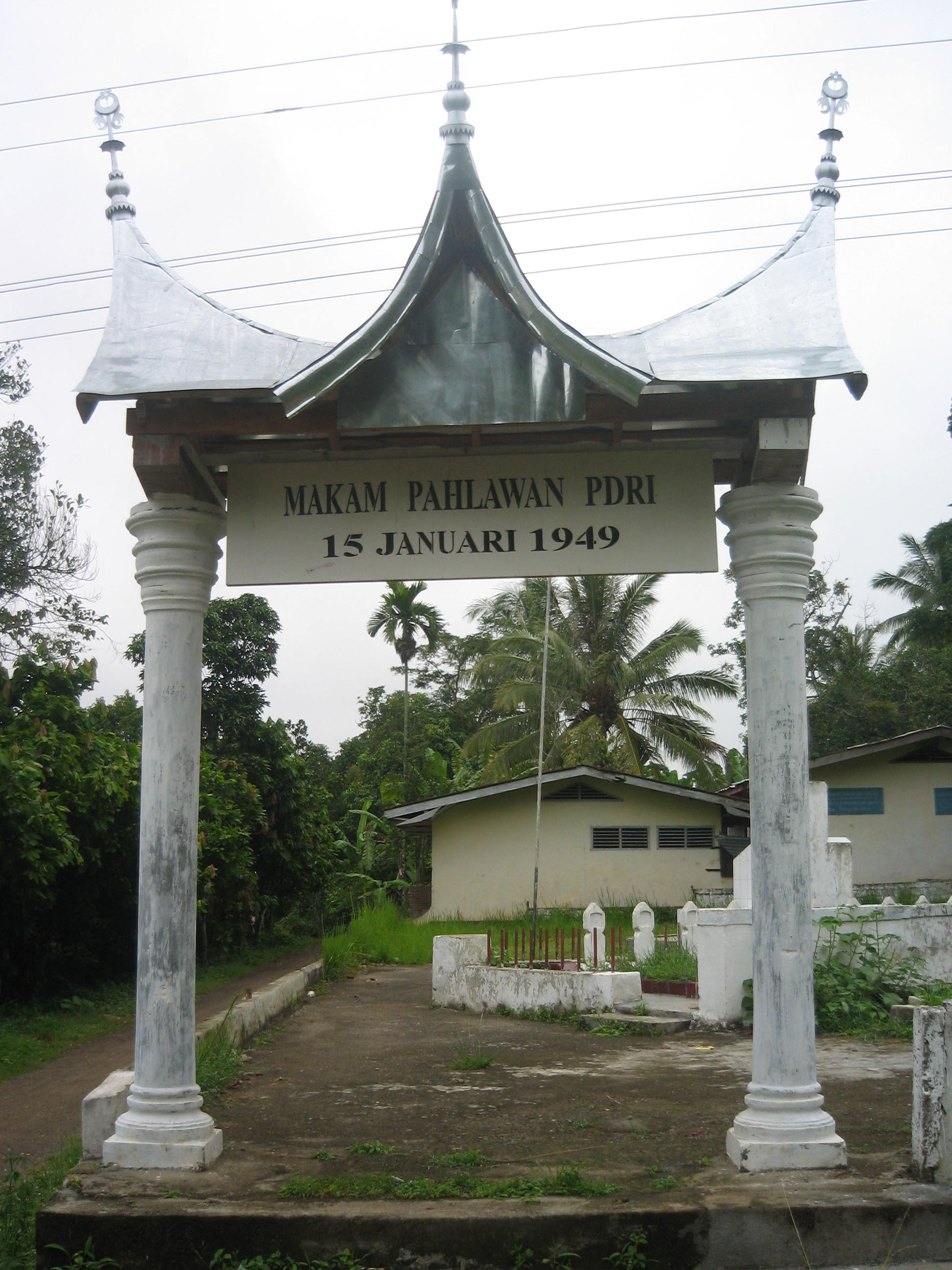 Makam Pahlawan Situjuah Gadang